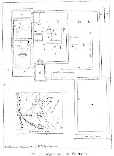 plan du sanctuaire de Thinissut en Tunisie